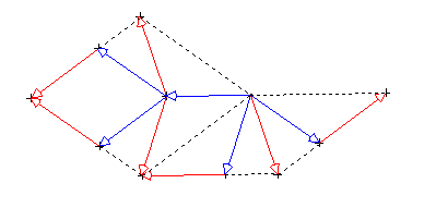 Découpage de losanges dans un pavage de Penrose. Image personnelle.